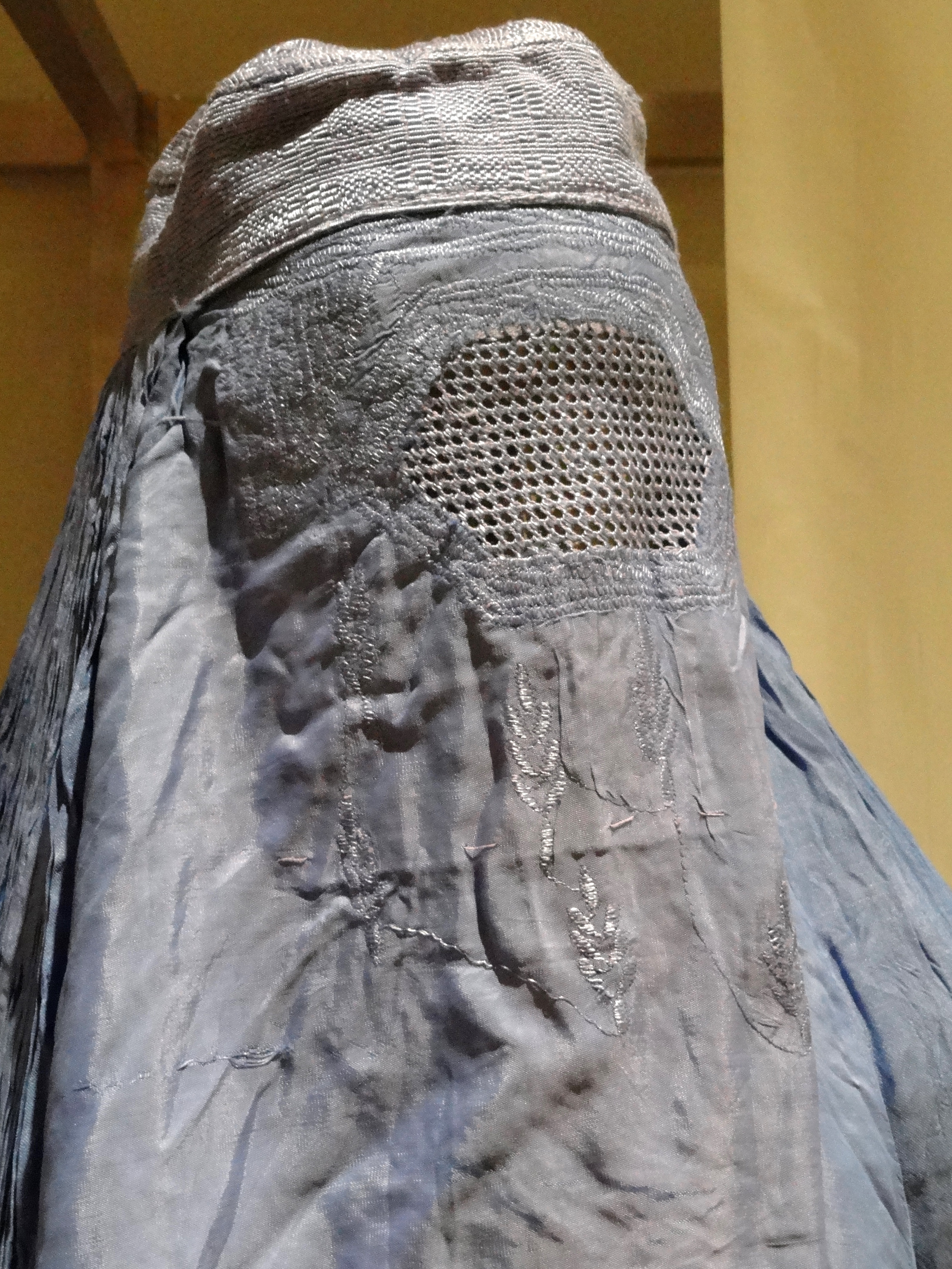 Exhibit in Bunka Gakuen Costume Museum, 3-22-7 Yoyogi, Shibuya-ku, Tokyo, Japan.